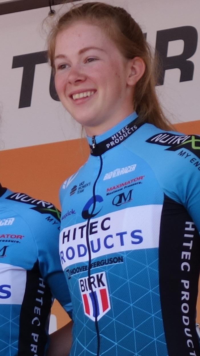 Lonneke Uneken (Hitec) bij de start van de eerste etappe van Stramproy naar Weert in de Boels Ladies Tour 2019